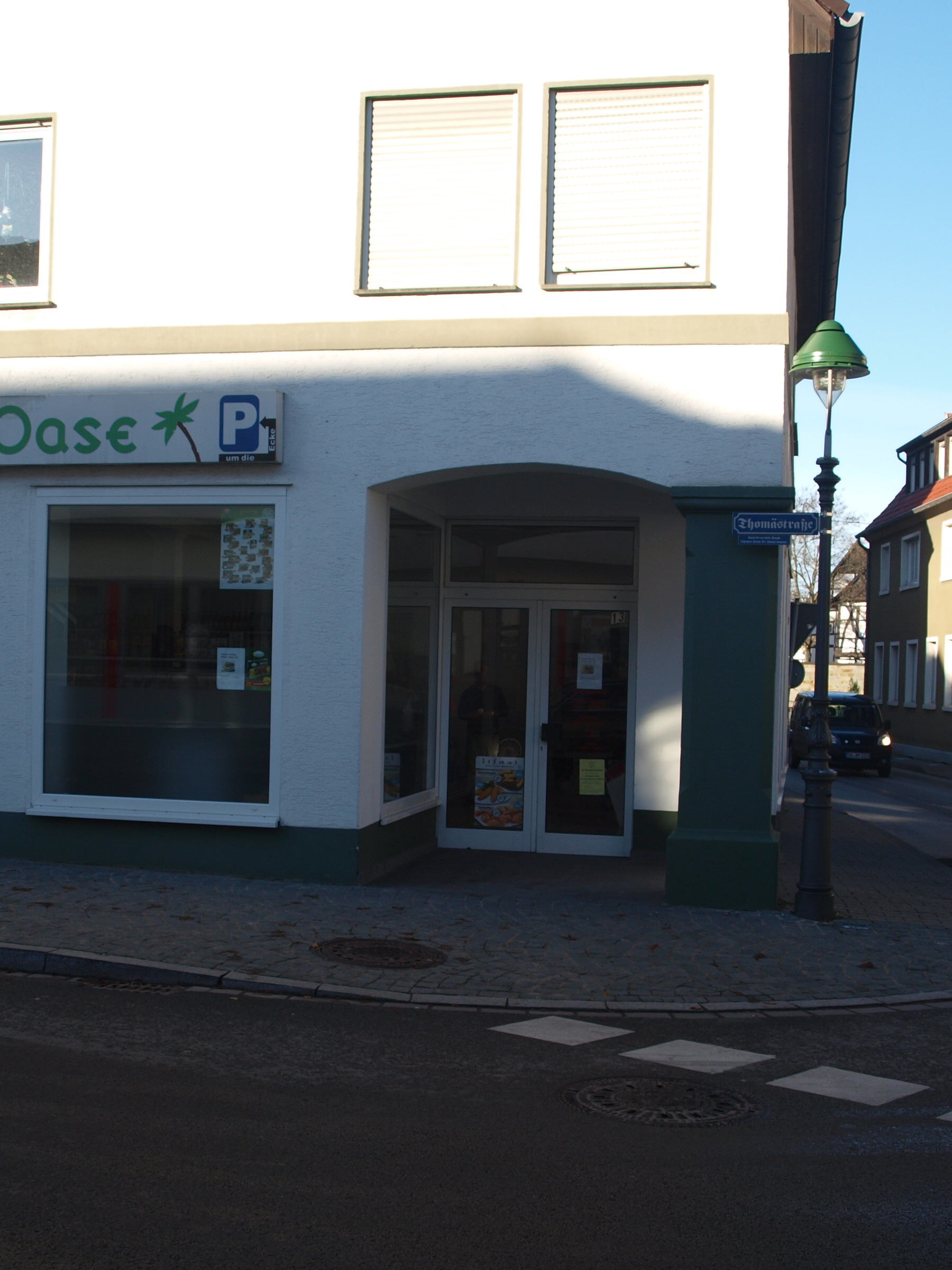 Stolpersteinlage in Soest Thomaestraße 13